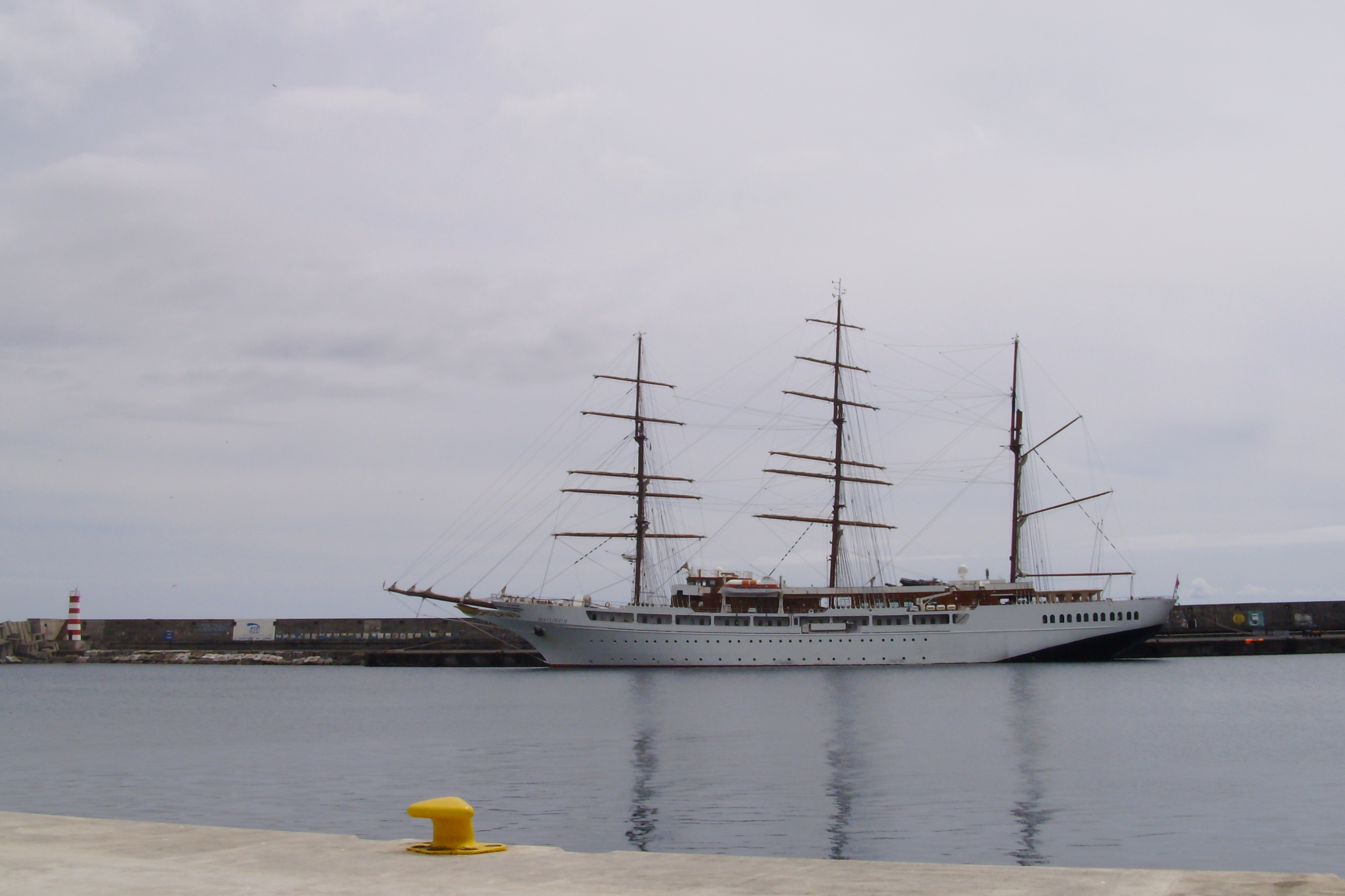 Sea Cloud II, Porto de Vila do Porto, ilha de Santa Maria, Açores.